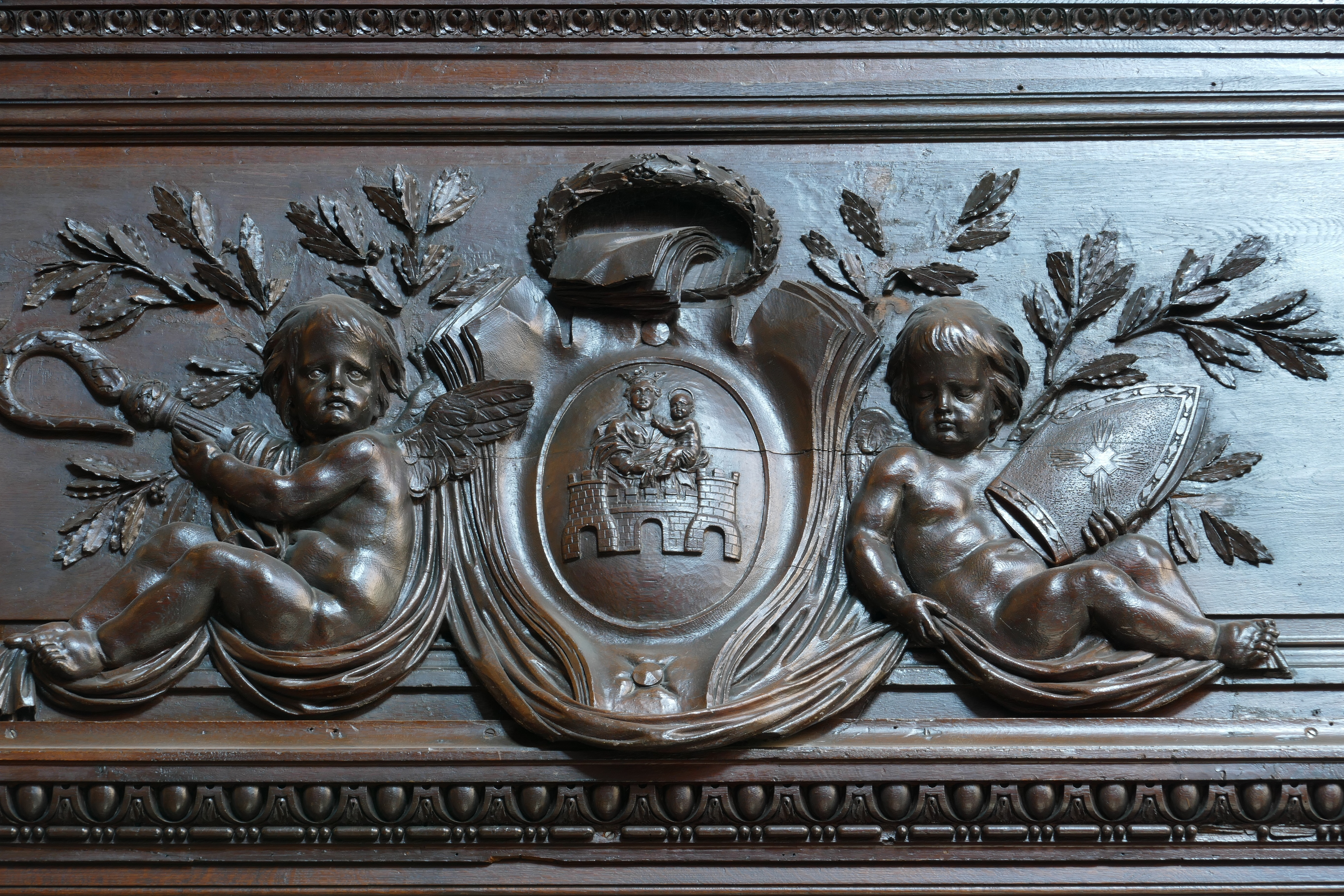 Alsace, Bas-Rhin, Église Saint-Nicolas de Haguenau, (Ancienne église du Couvent des Prémontrés) (PA00084725, IA00061903). Lambris de revêtement de style Louis XVI (XVIIIe, proviennent de l'ancienne Abbaye Neubourg): armoiries de l'abbaye Notre-Dame de Neubourg. This object is classé Monument Historique in the base Palissy, database of the French furniture patrimony of the French ministry of culture, under the references PM67000600, IM67001706 and IM67002707.